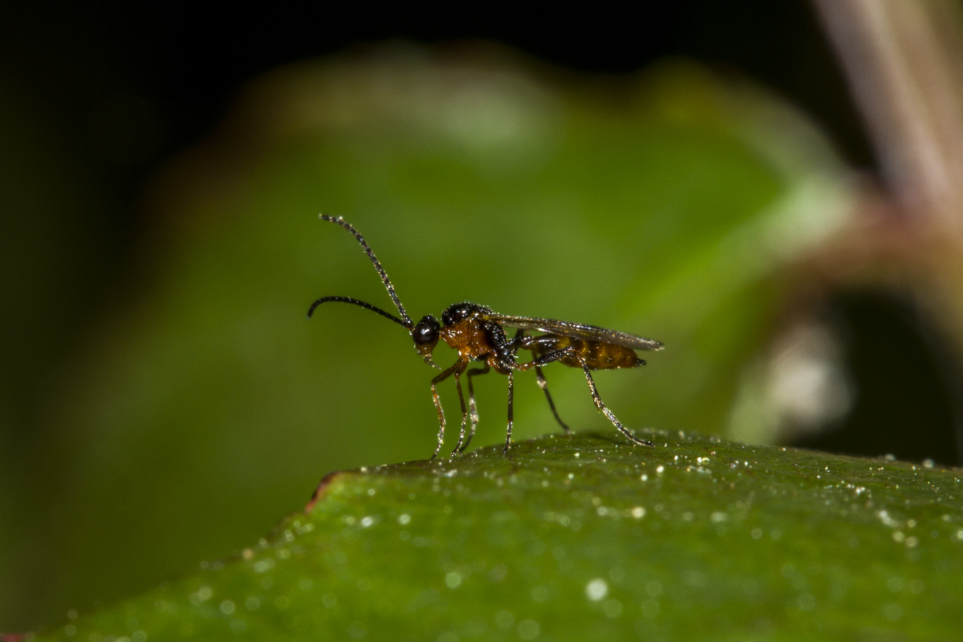 Aphidius Ervi - Aphid parasitoid.